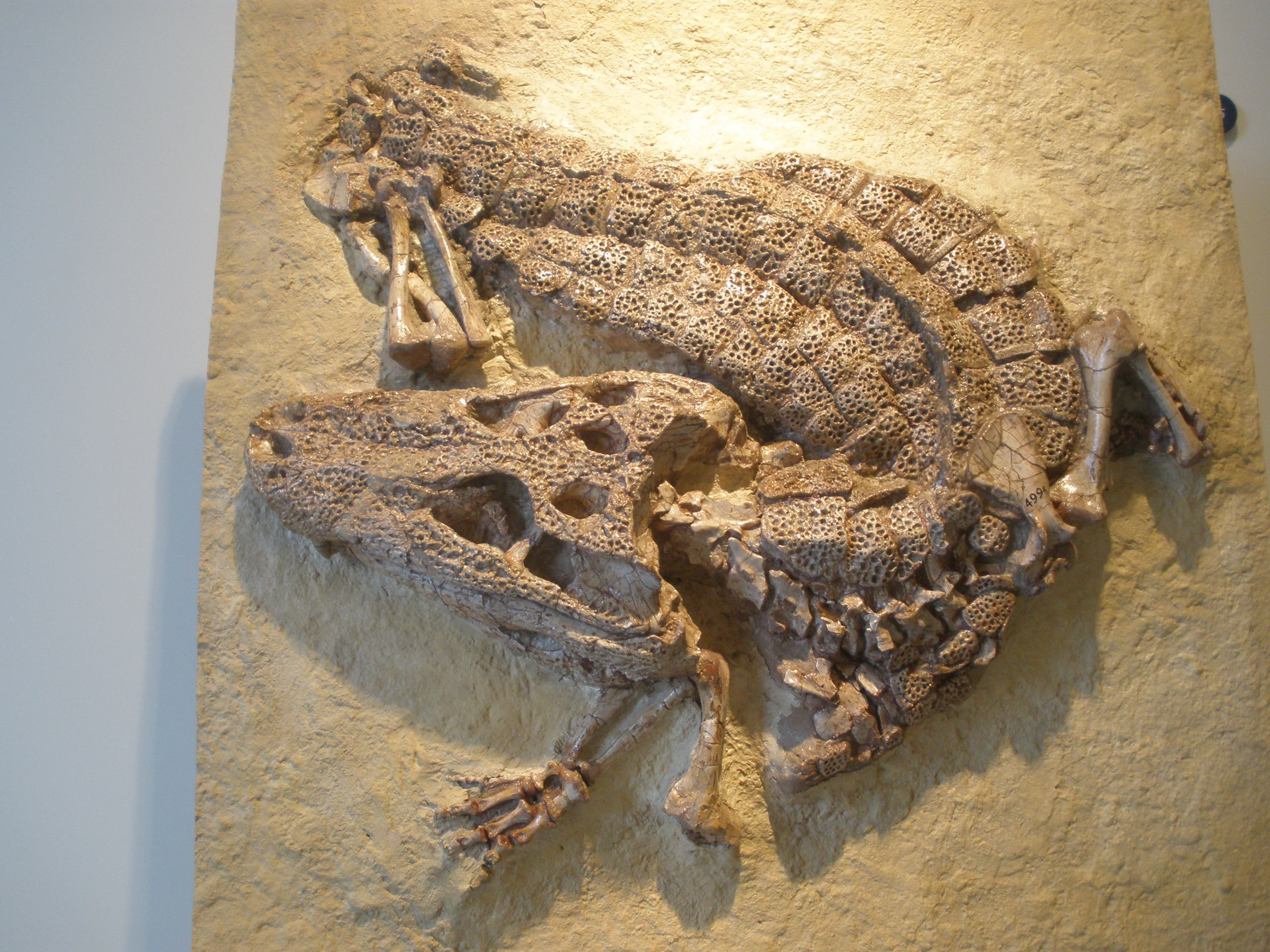 Skeleton of Alligator prenasalis, a fossil gator